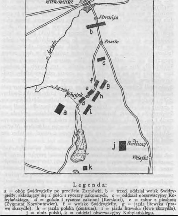 Bitwa pod Wiłkomierzem